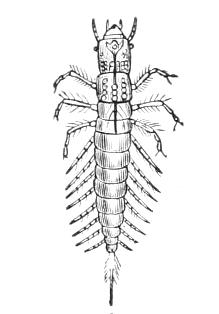 Sialis larva.